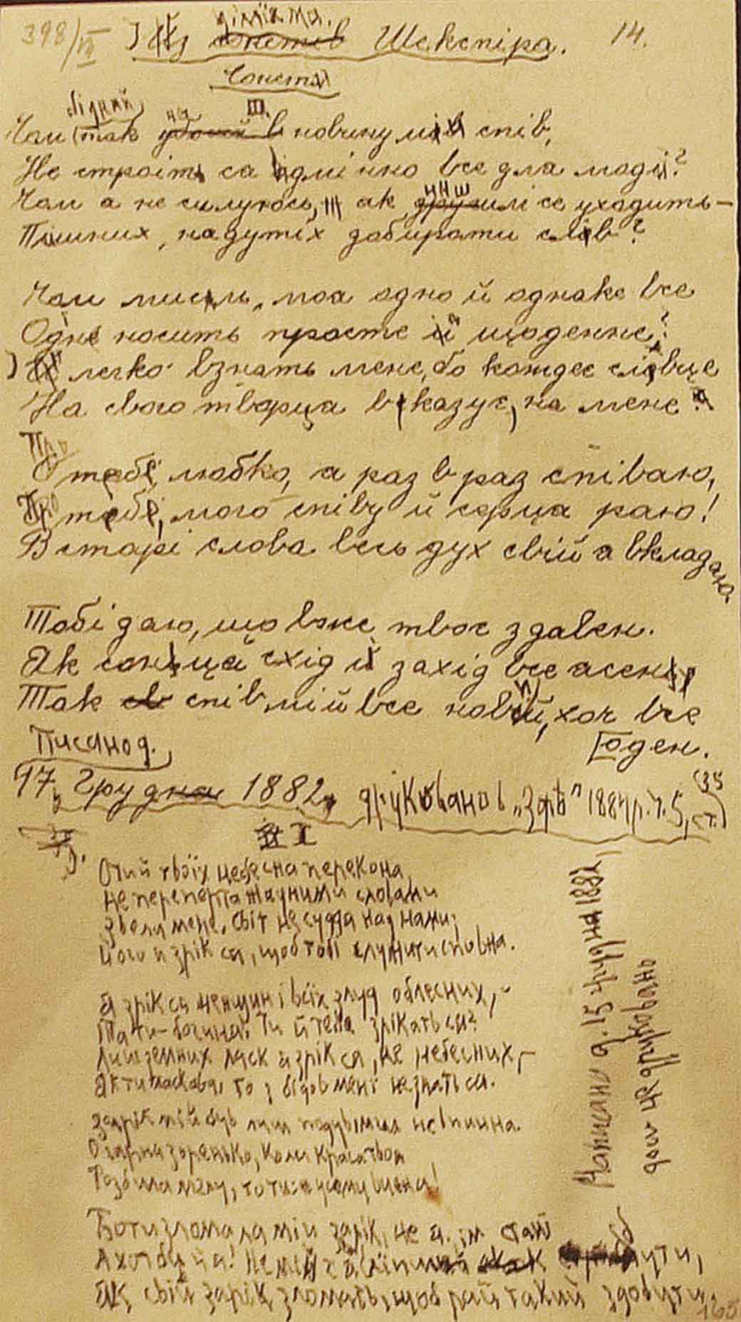 Вільям Шекспір "Венеційський купець". Фрагмент перекладу Івана Франка, 1912